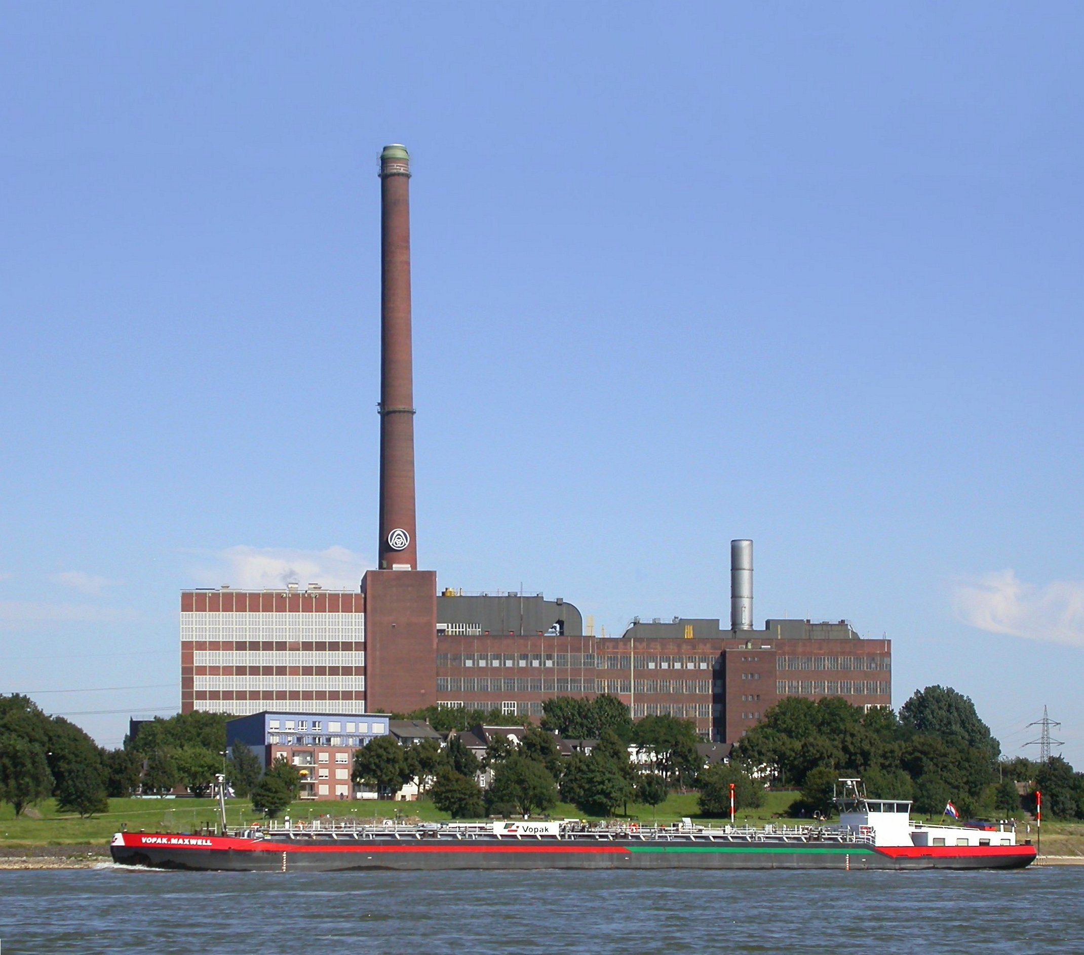 ThyssenKrupp-Kraftwerk "Hermann Wenzel"